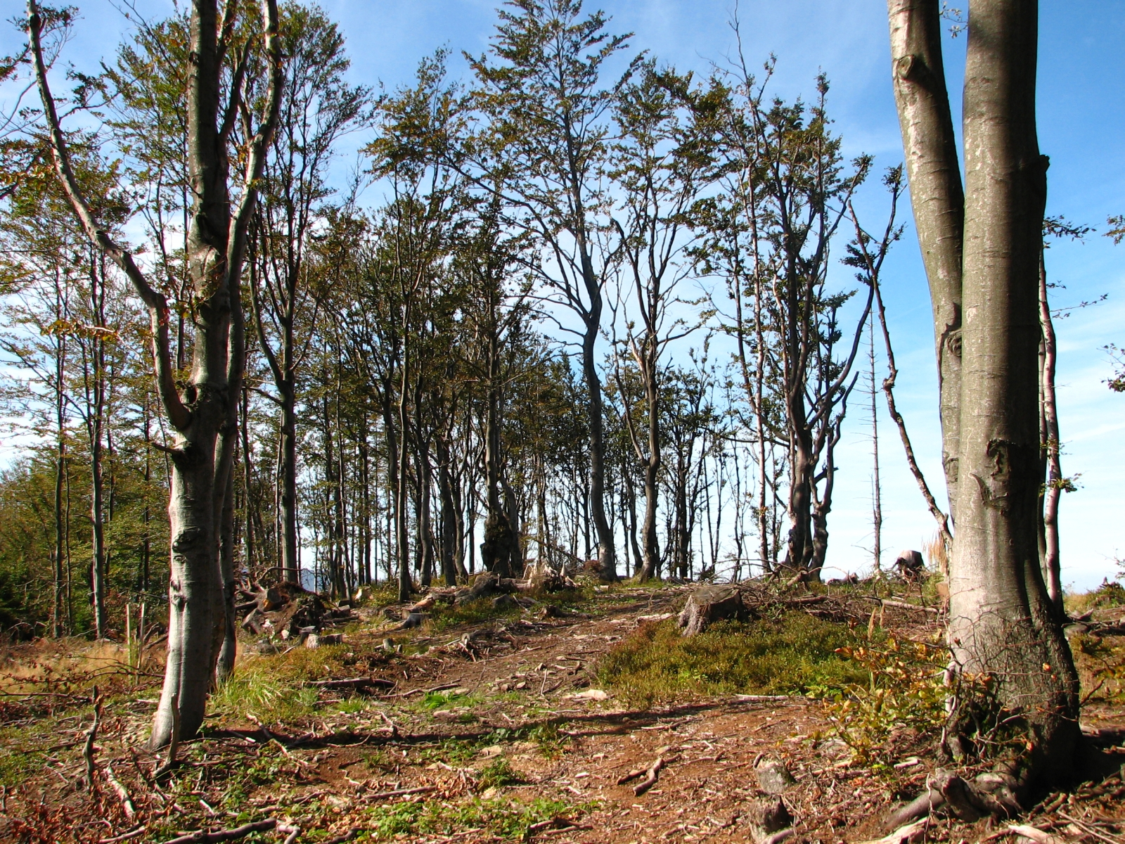 Buczyna karpacka na szczycie góry Czupel